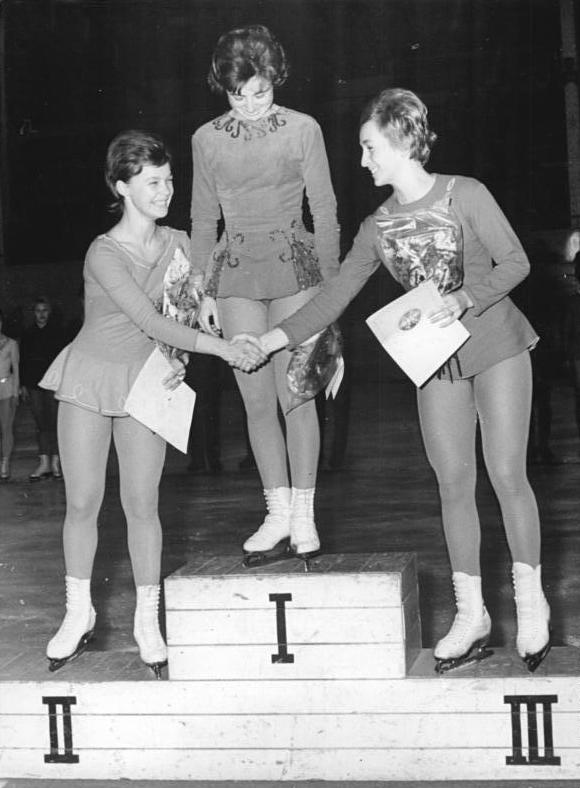 Gabriele Seyfert, Eva Grozajova, Heidi Steiner Zentralbild Eckleben Sta-Krz. 18.11.1962 Eiskunstlauf - Eva Grozajova siegte bei den Frauen Mit der Frauenkonkurrenz gingen am 17.11.62 in der Berliner Werner-Seelenbinder-Halle die viertägigen Eiskunstlauf-Wettbewerbe um den Pokal des Deutschen Eislaufverbandes zu Ende. Nach drei DDR-Siegen gab es diesmal durch Eva Grozajova einen Erfolg für die CSSR. Mit 235, 74 Punkten und der Platzziffer 7 verwies die Zehnte der Europameisterschaft die beiden DDR-Läuferinnen Gabriele Seyfert und Heidi Steiner auf die Plätze. UBz: Während der Siegerehrung. vlnr: Gabriele Seyfert, Eva Grozajova und Heidi Steiner. Abgebildete Personen: Seyfert, Gabriele: Eiskunstläuferin, Olympiade 1964 und 1968, DDR Steiner, Heidemarie: Eiskunstläuferin, SC Dynamo Berlin, Olympiade 1968, DDR Grozajova, Eva: Eiskunstläuferin, CSSR